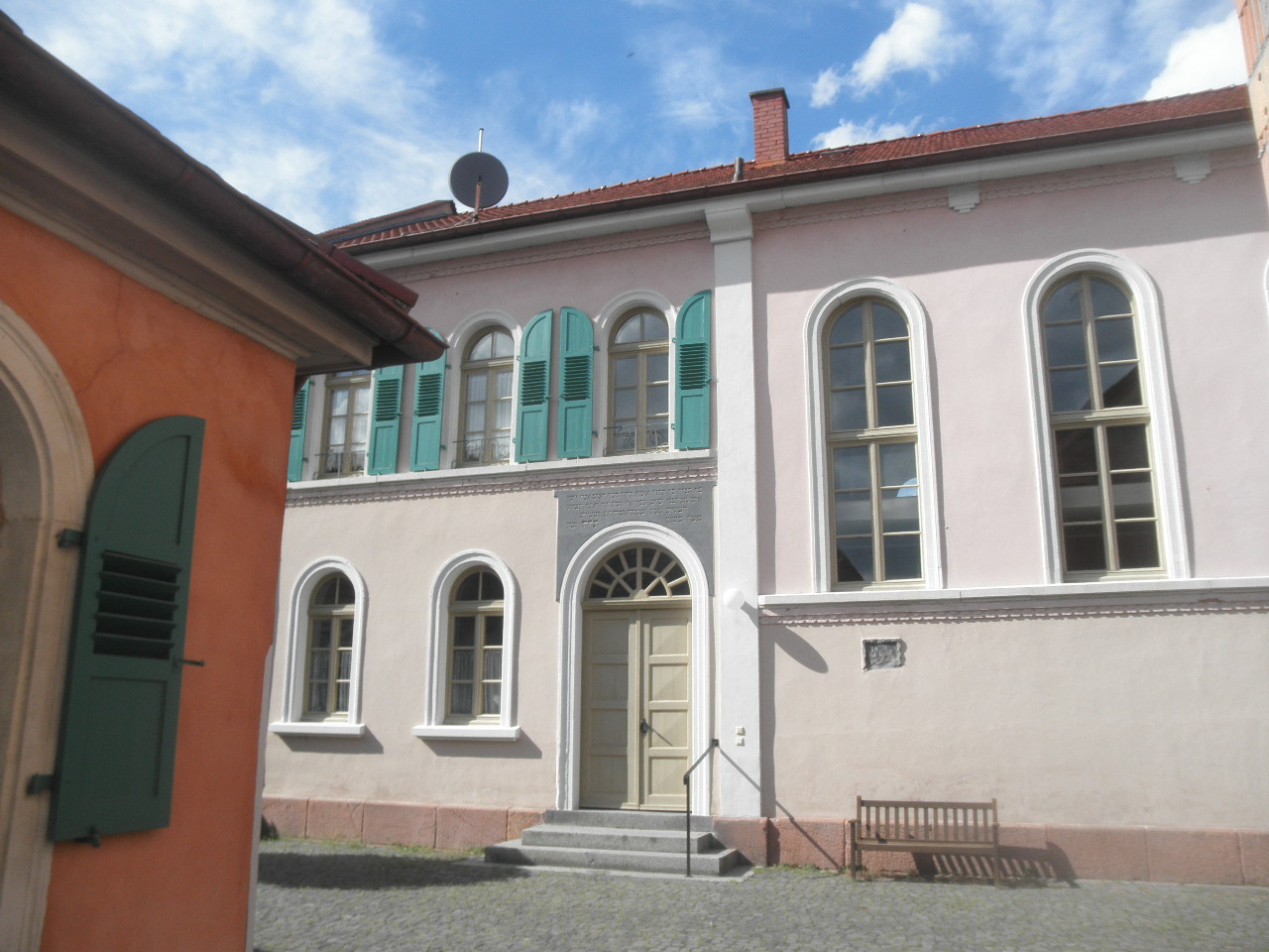 la historia sinagogo de Hemsbach, Germanio, maldekstre la mikveo